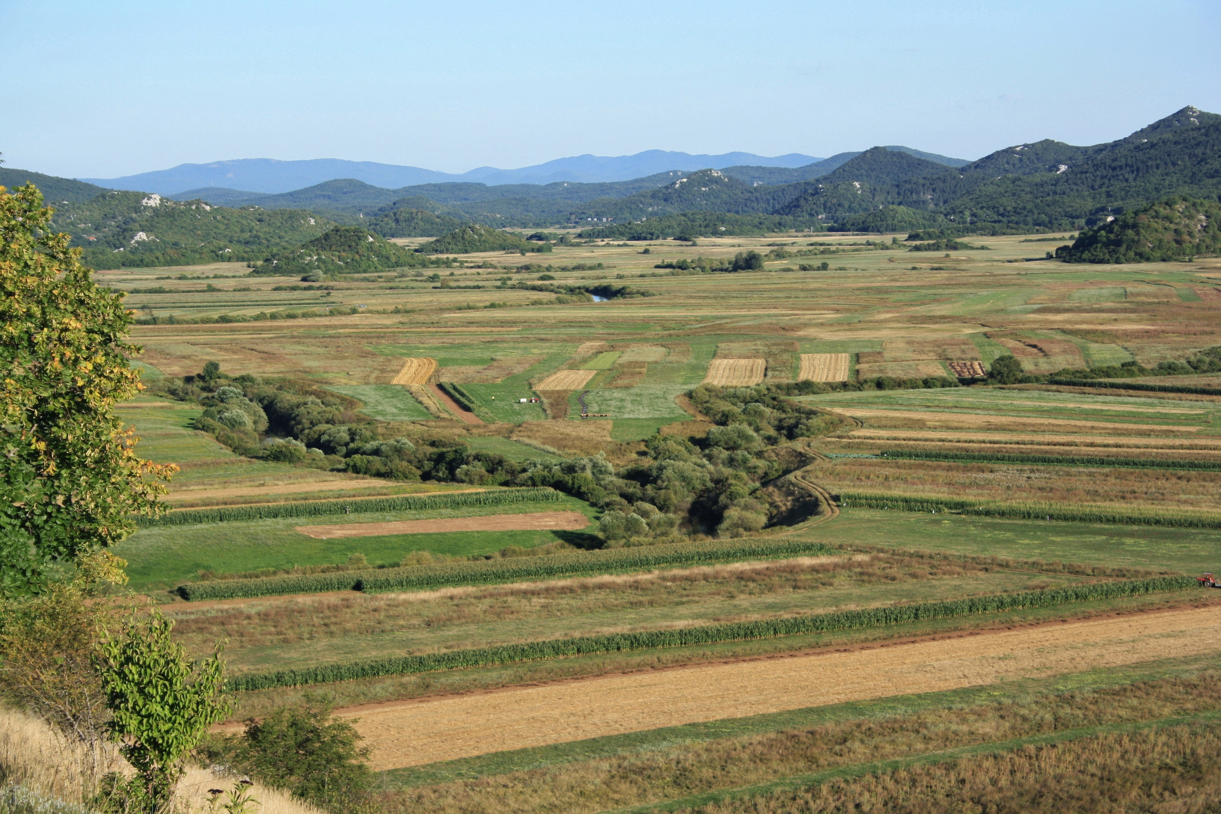 Kosinjska Dolina